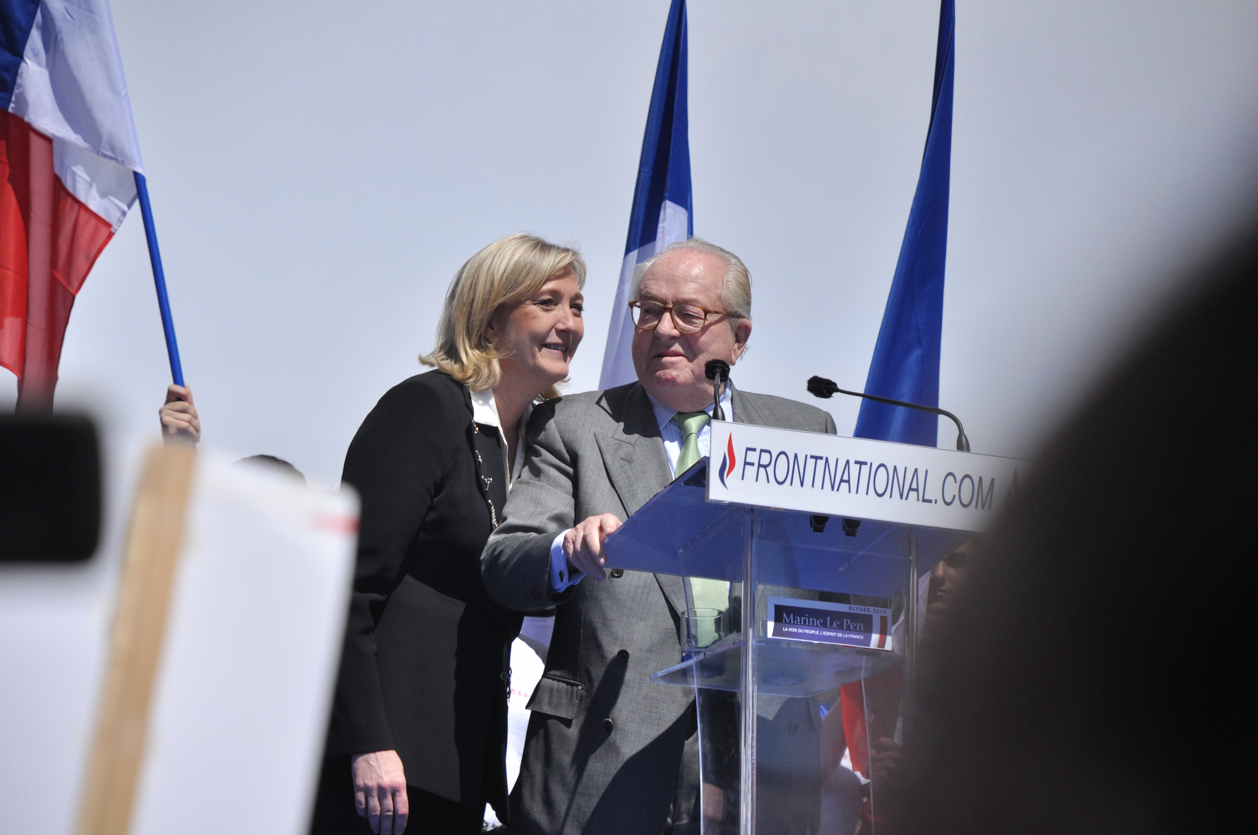 Le 1er mai 2012, comme chaque année, les militants du Front National ont défilé dans Paris et se sont retrouvés devant l'Opéra Garnier pour un meeting. Jean-Marie Le Pen et Marine Le Pen y ont prononcé chacun un discours, en pleine campagne de l'entre-deux tours de la présidentielle. Parmi les attentes, une consigne de vote de la part de la présidente du FN, qui n'en a pas donnée et a annoncé voter blanc à titre personnel.